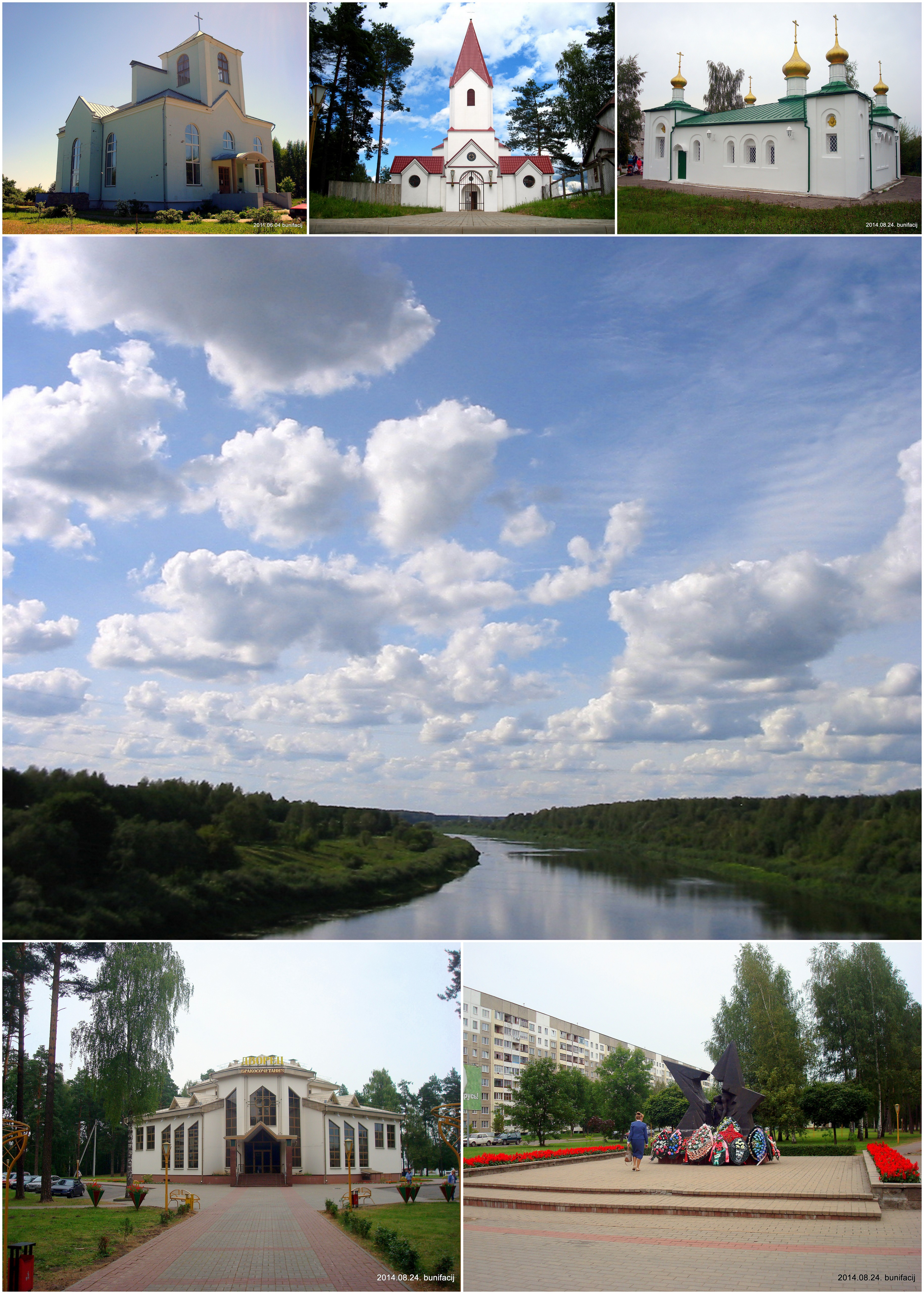 Калаж для артыкулаў пра Наваполацк з фотаздымкаў